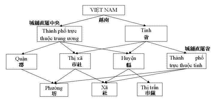 越南行政分區，來源自 :vi:Hình:PhancaphanhchinhVN.png